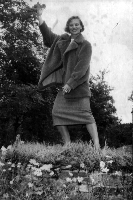 Ellen Bergman vid Billingsfors friluftsteater. Införd i Svenska Dagbladet 1953-08-02 sid 16.